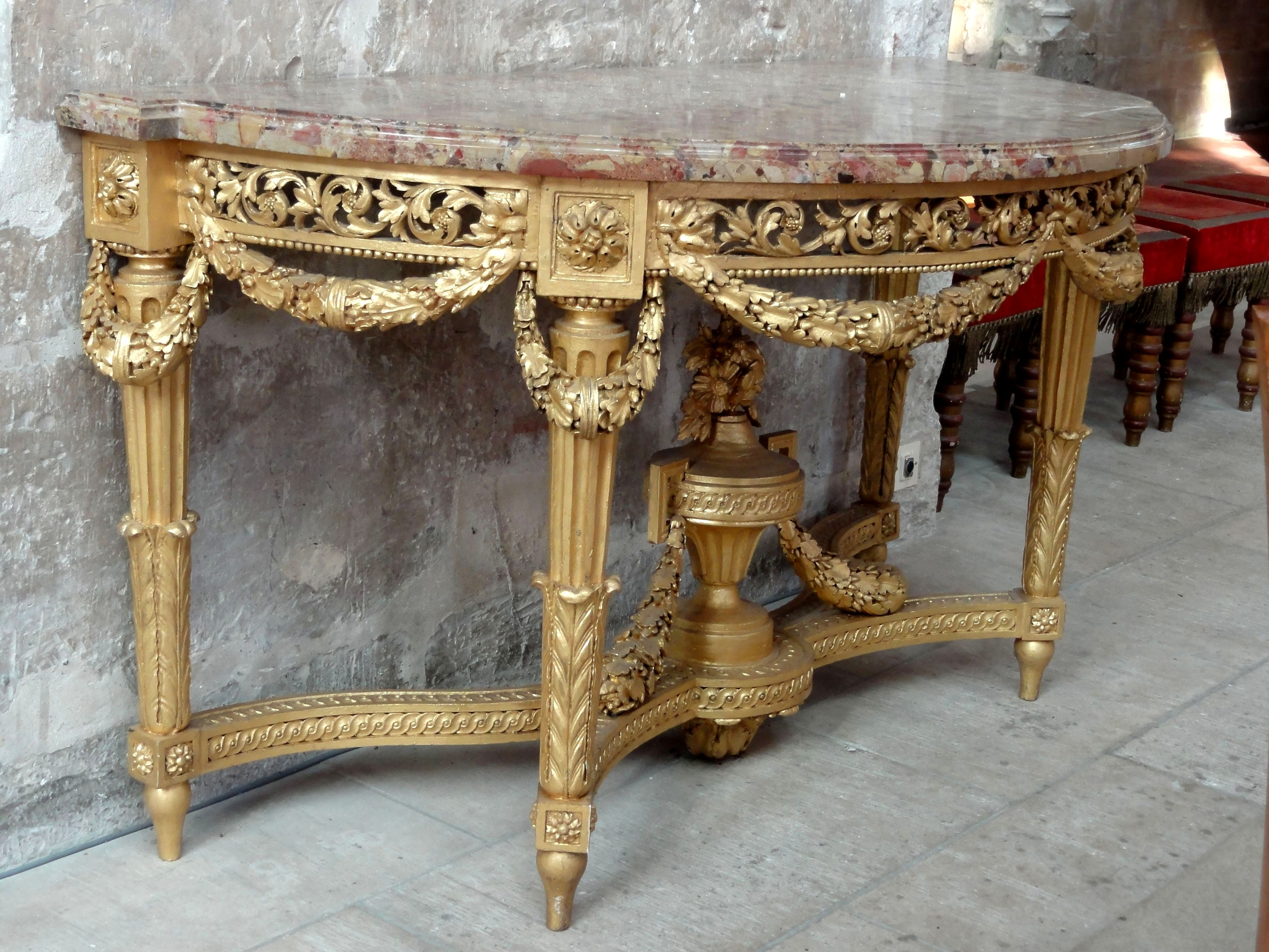 Ensemble de 2 crédences de style Louis XVI.